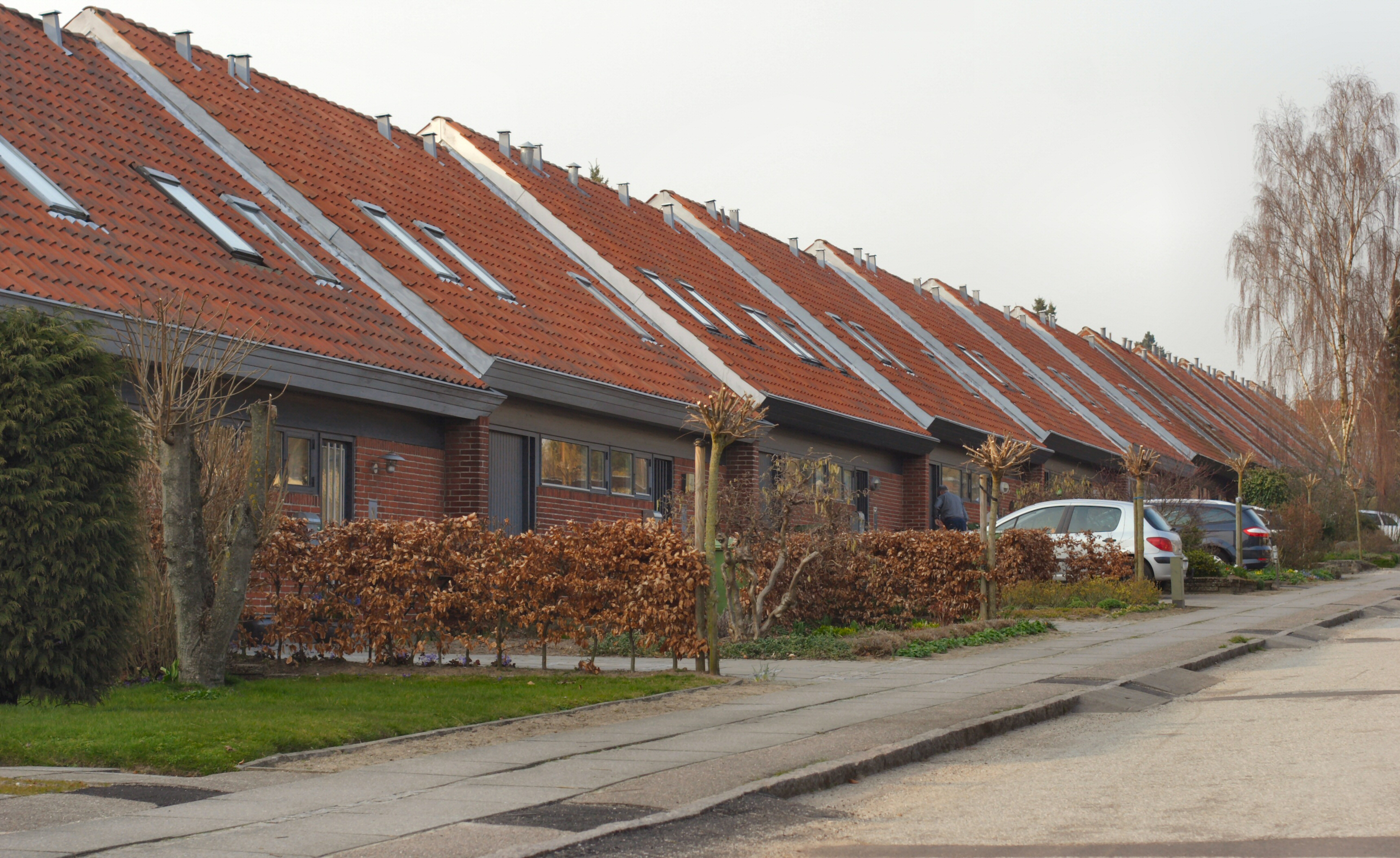 Rækkehuse i Århus